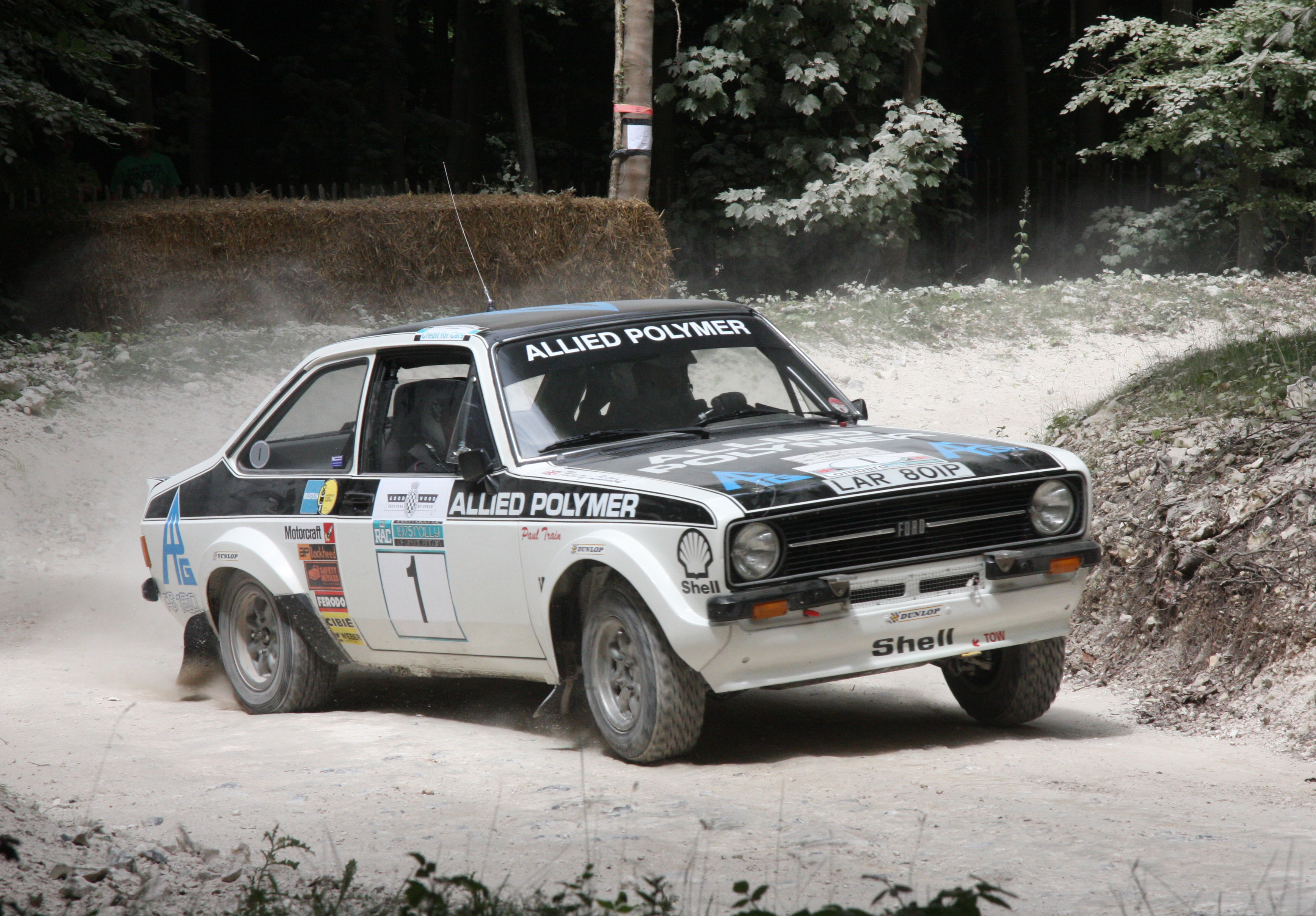 Ford Escort RS1800.